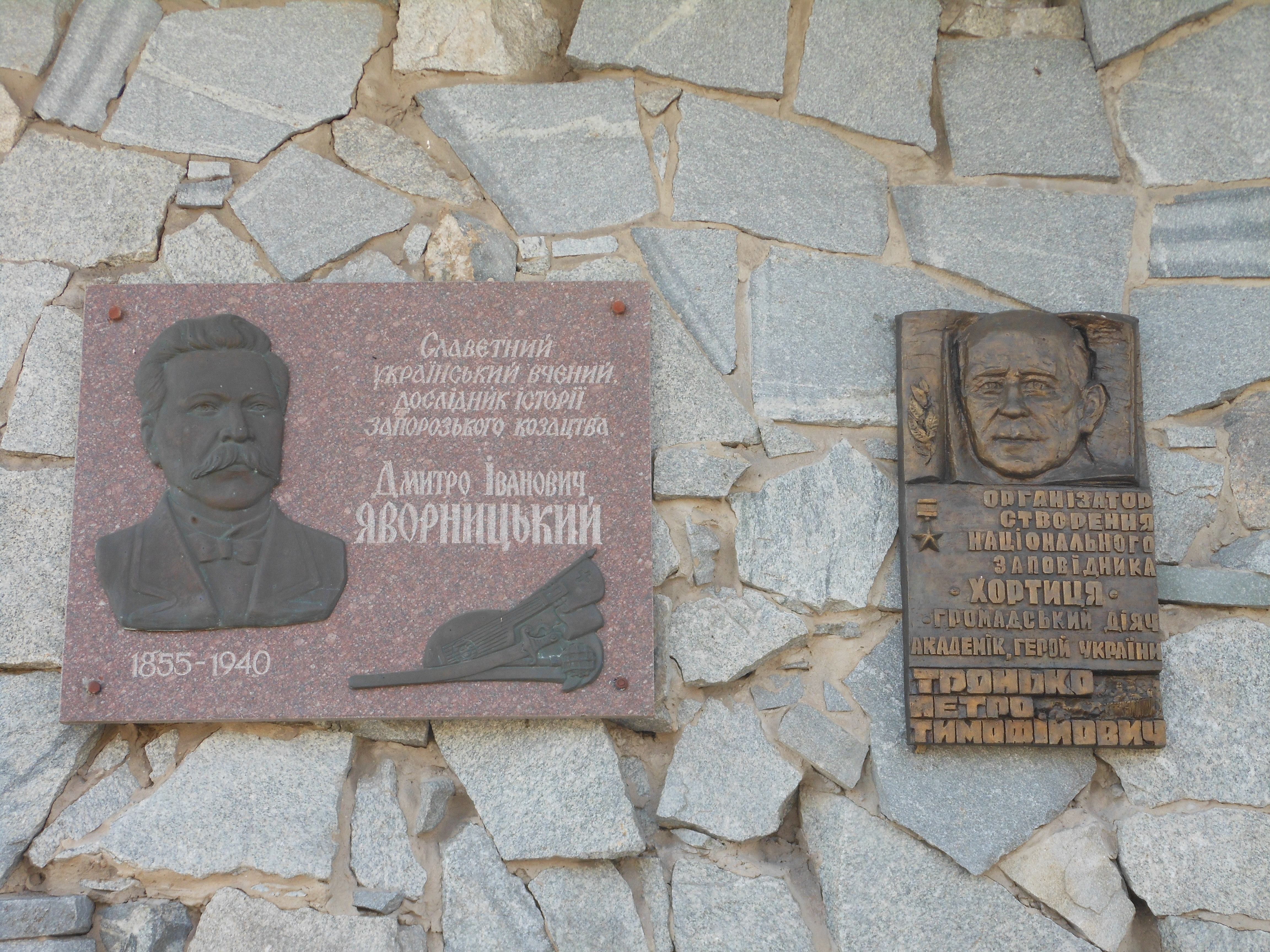 Меморіальні таблички Дмитру Яворницькому і Петру Тронько на стіні Музея історії запорізького козацтва. Національний заповідник «Хортиця», Запоріжжя, острів Хортиця